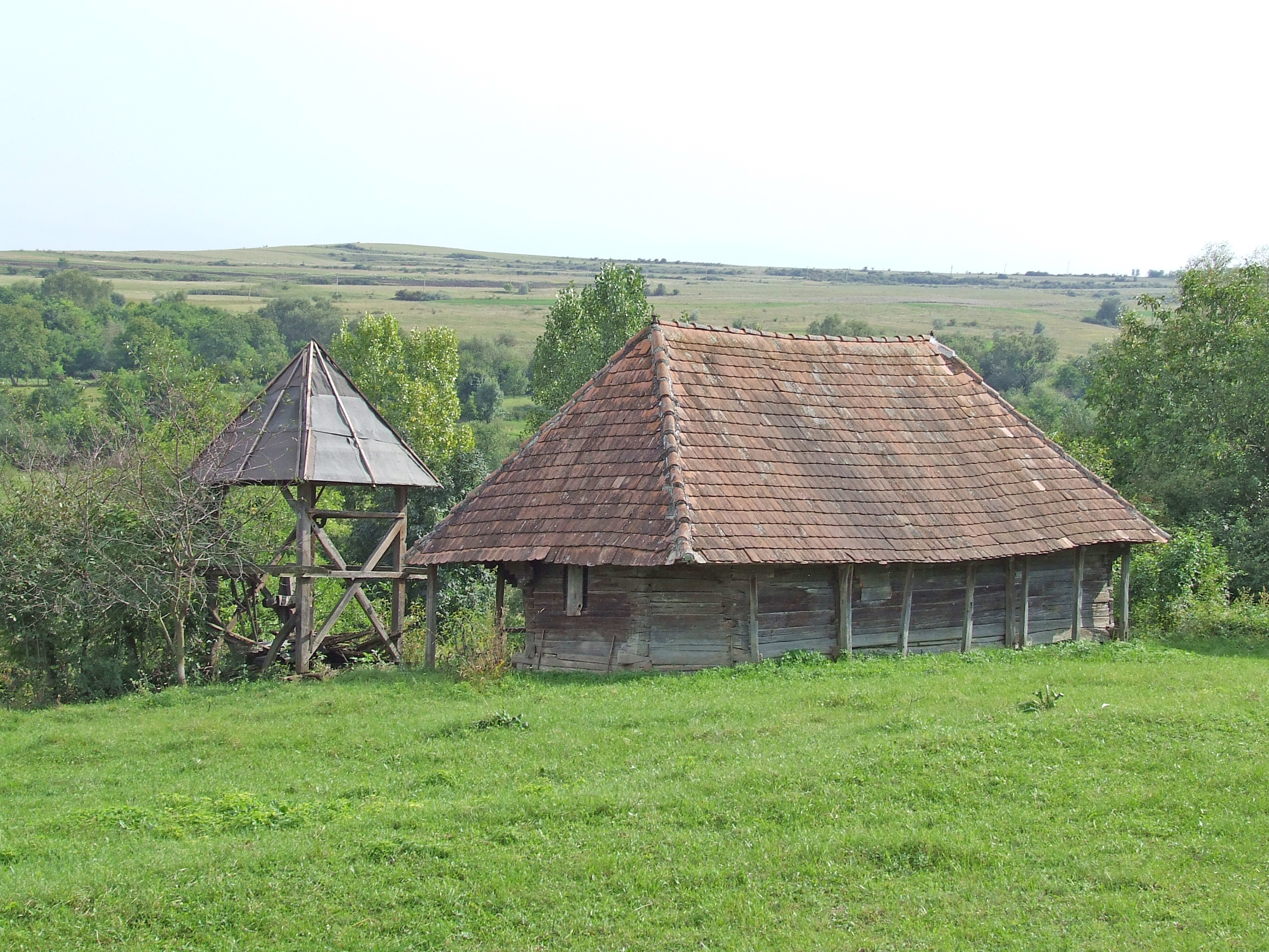 Biserica de lemn din Chiunciuş, judeţul Mureş.